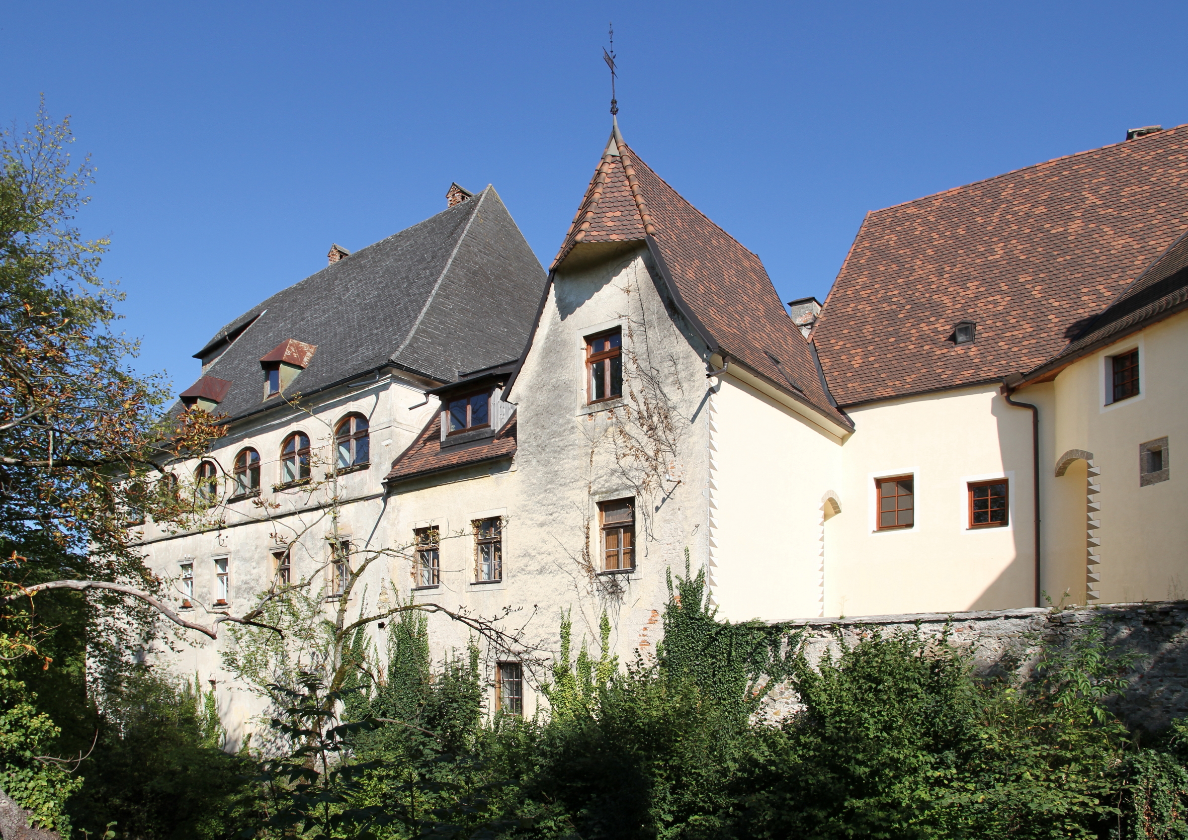 Wohntrakt des niederösterreichischen Schlosses Purgstall.